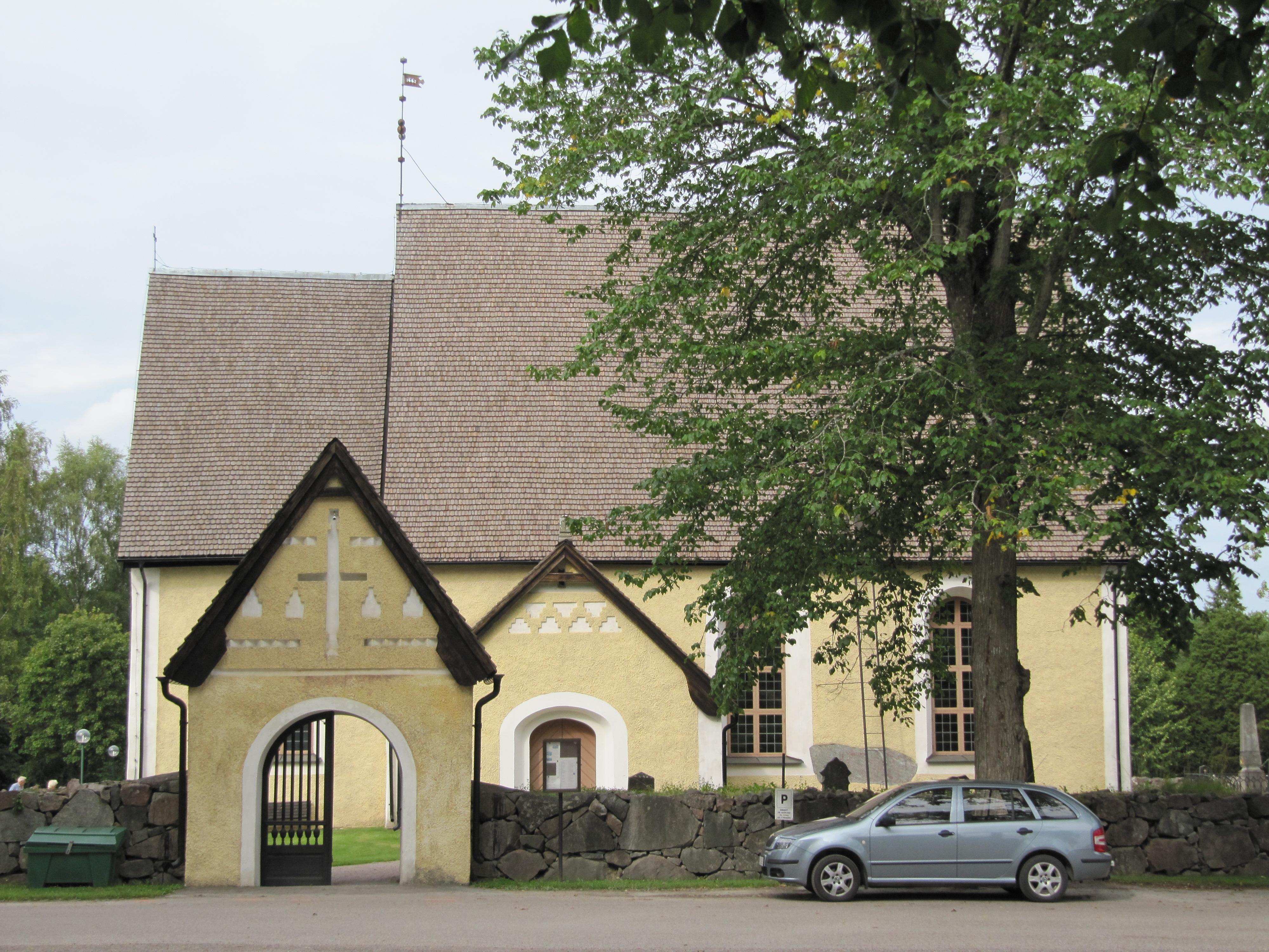 Stavby kyrka med stiglucka.